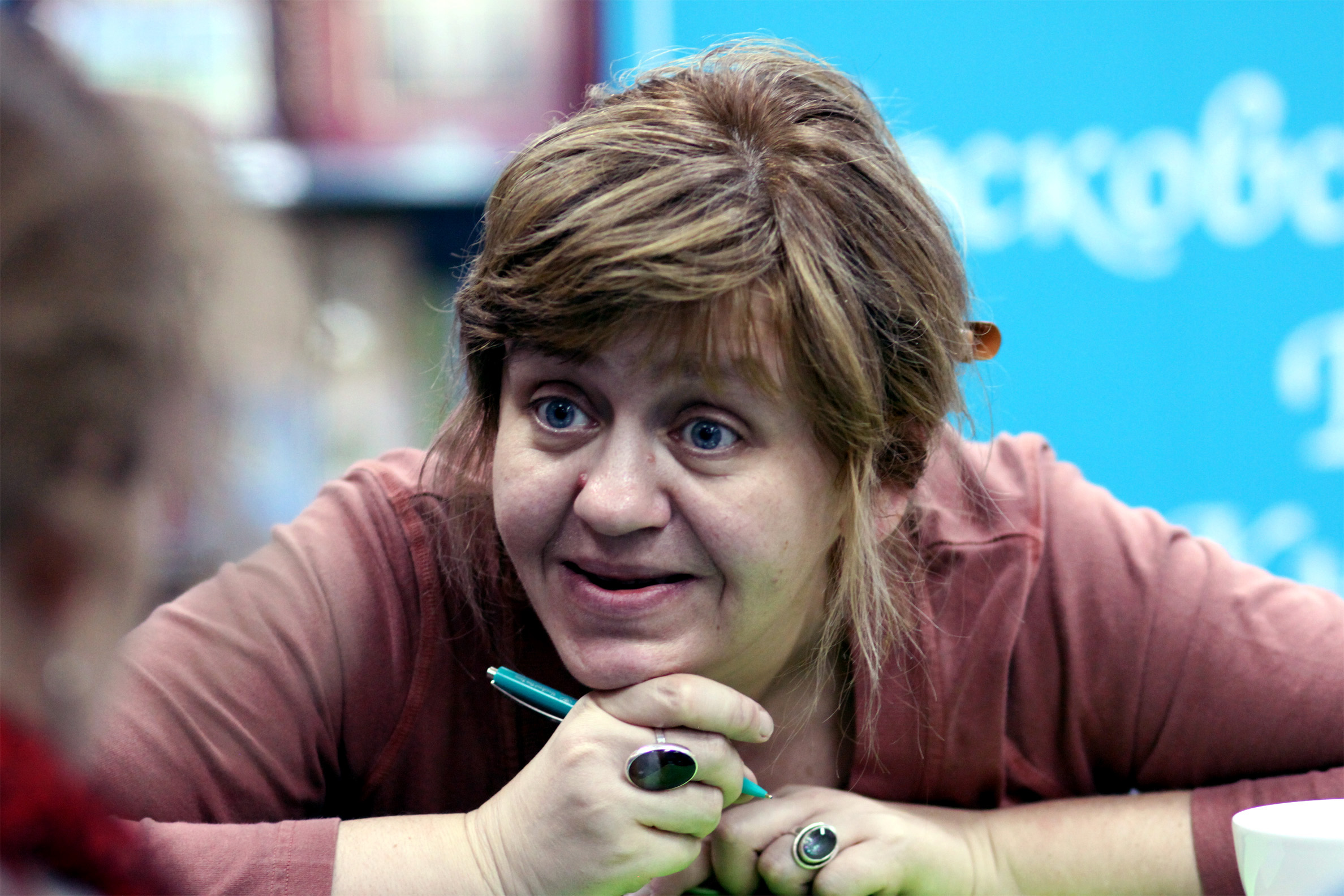 Svetlana Martynchik